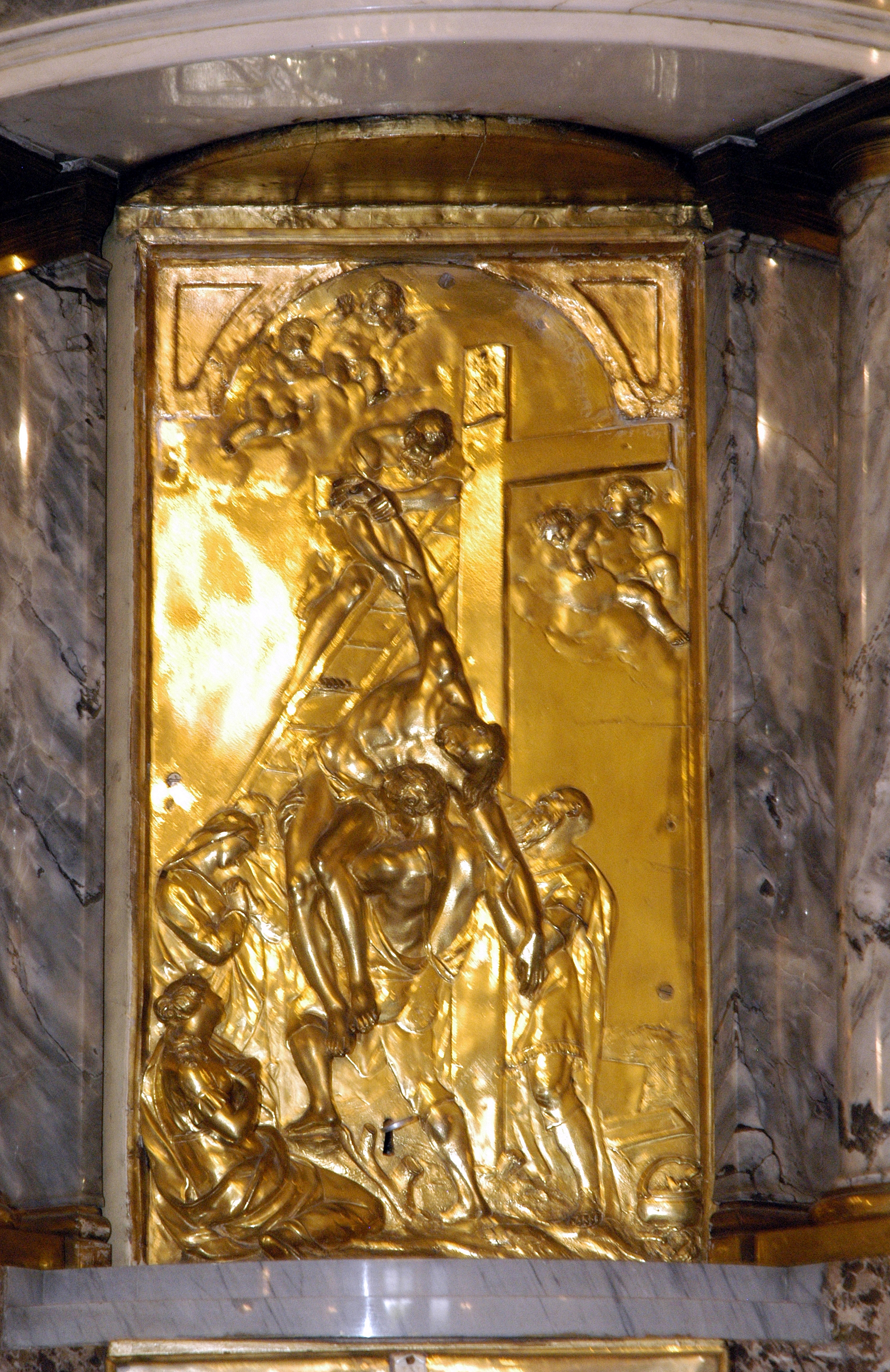 Tabernakel des Hochaltares in der Invalidenhauskirche